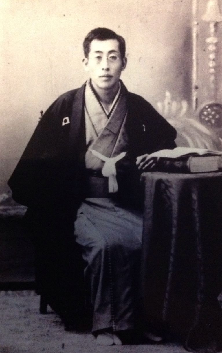 二木謙三の弟の樋口譲助